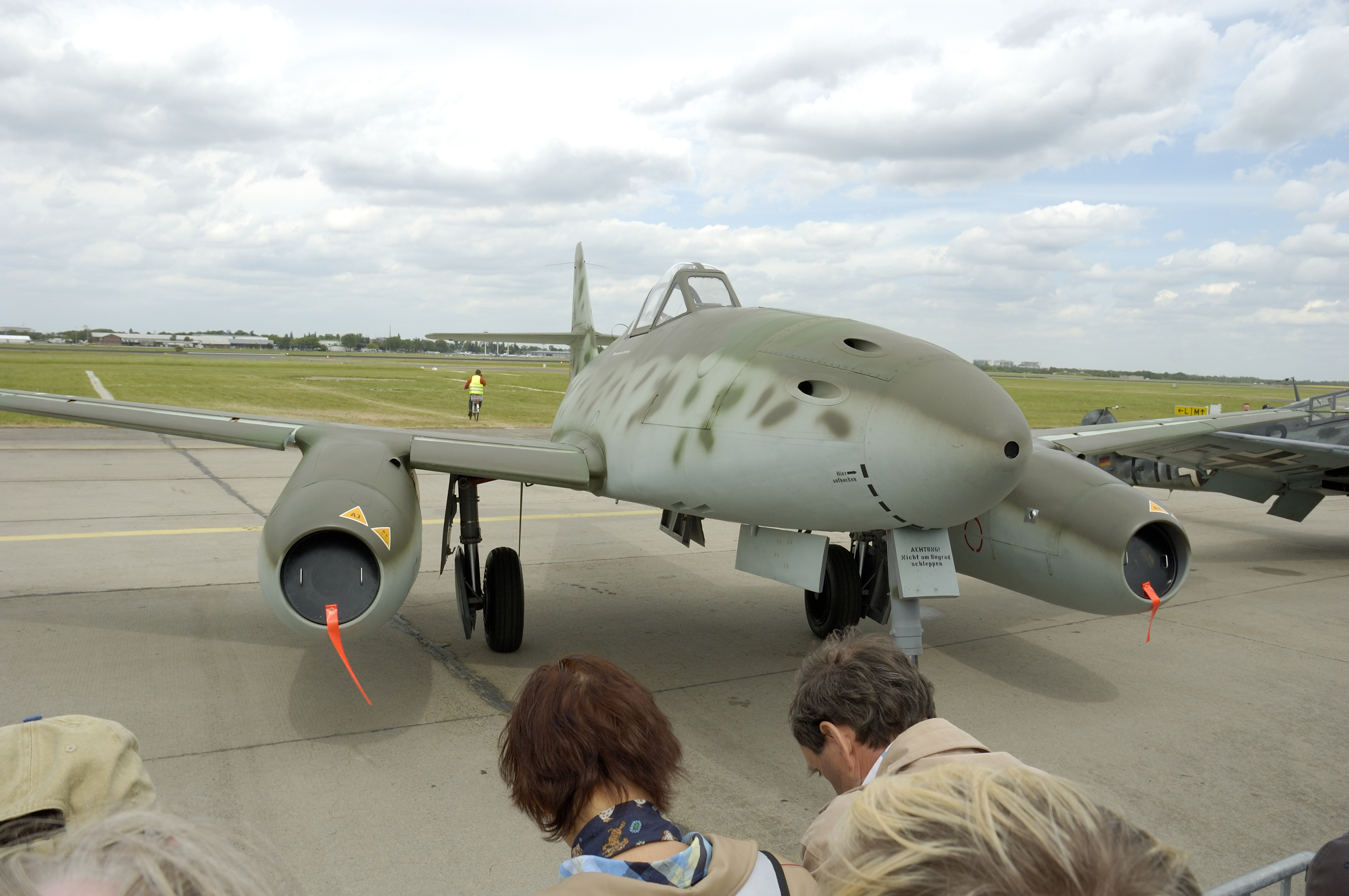 Nachbau der Messerschmitt 262, des ersten in Serie gebautem strahlgetriebenen Jagdflugzeuges. Foto von Oliver Thiele , Mai 2006